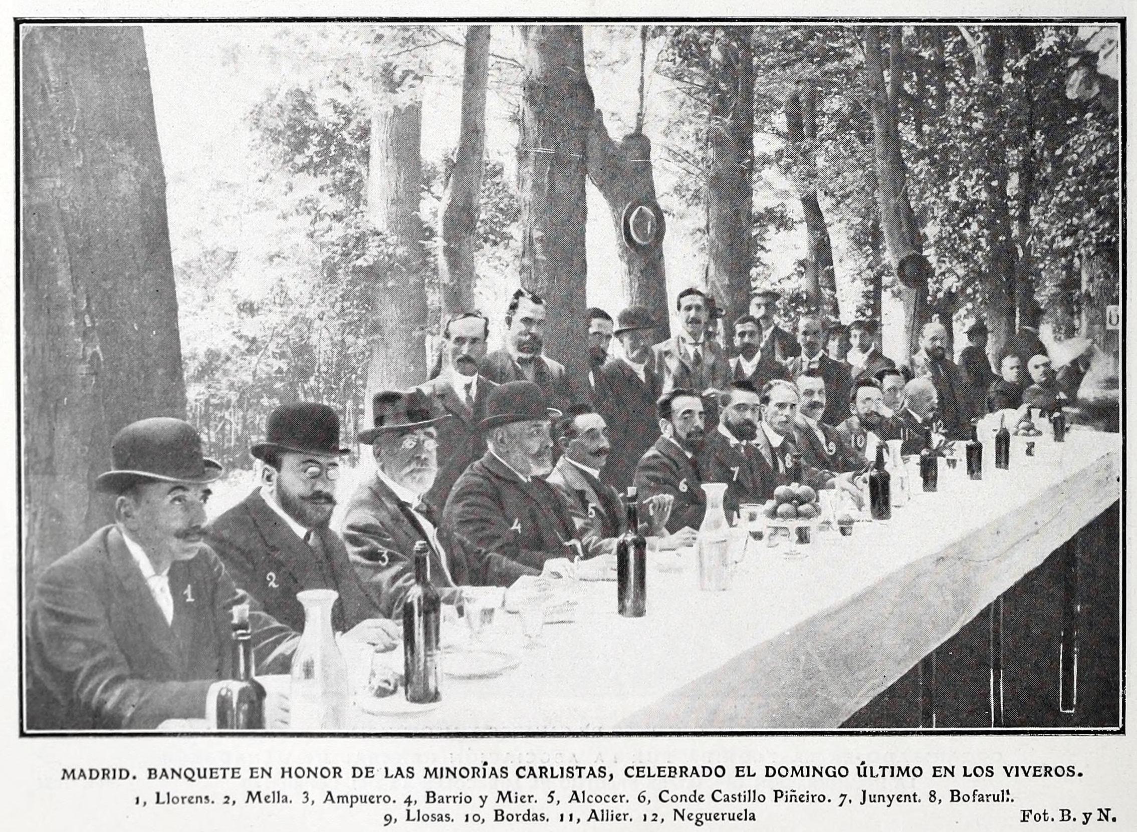 Madrid, banquete en honor de las minorías carlistas.